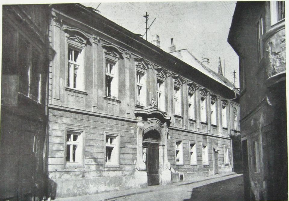 Brauneckerov palác